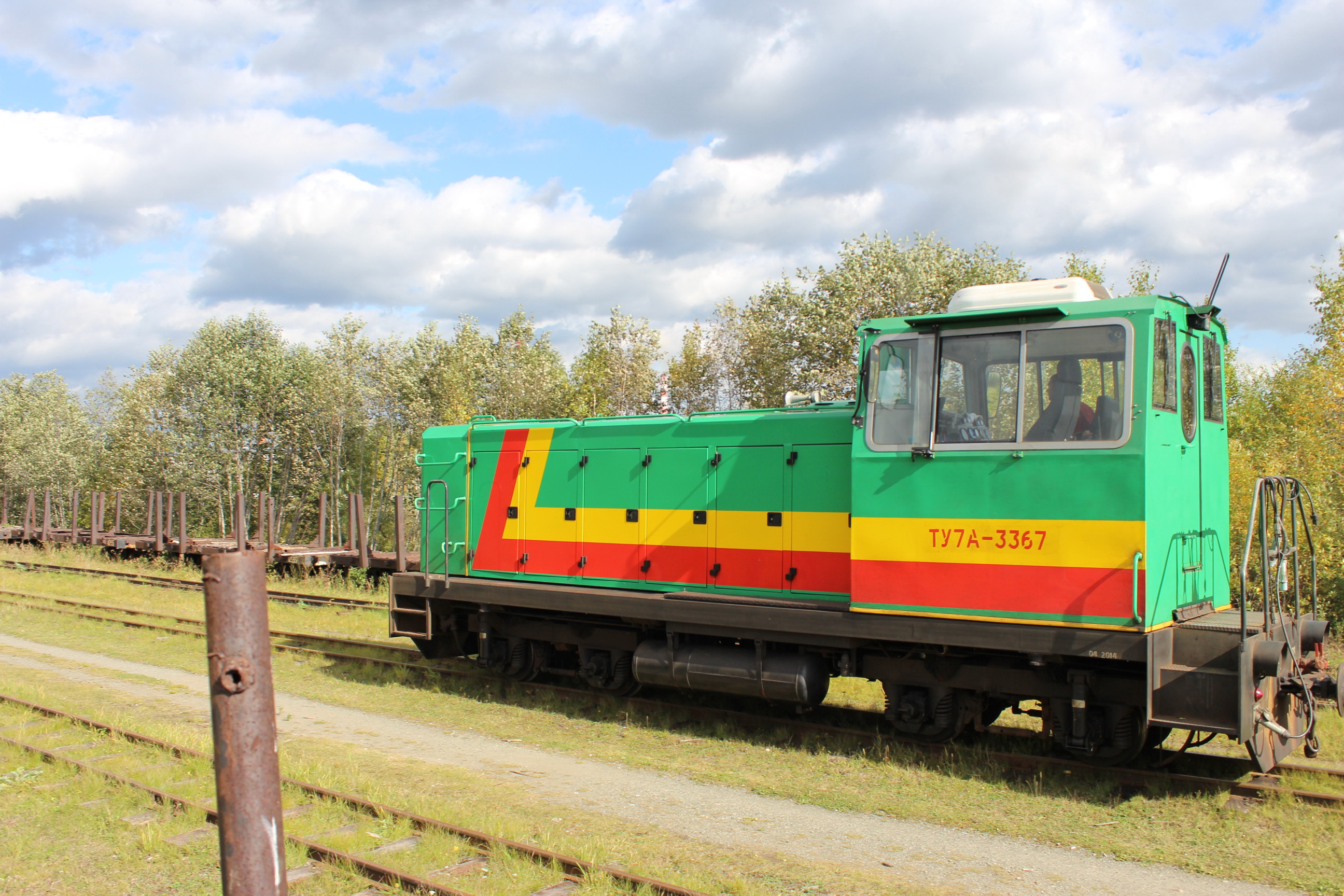 Тепловоз ТУ7А-3367